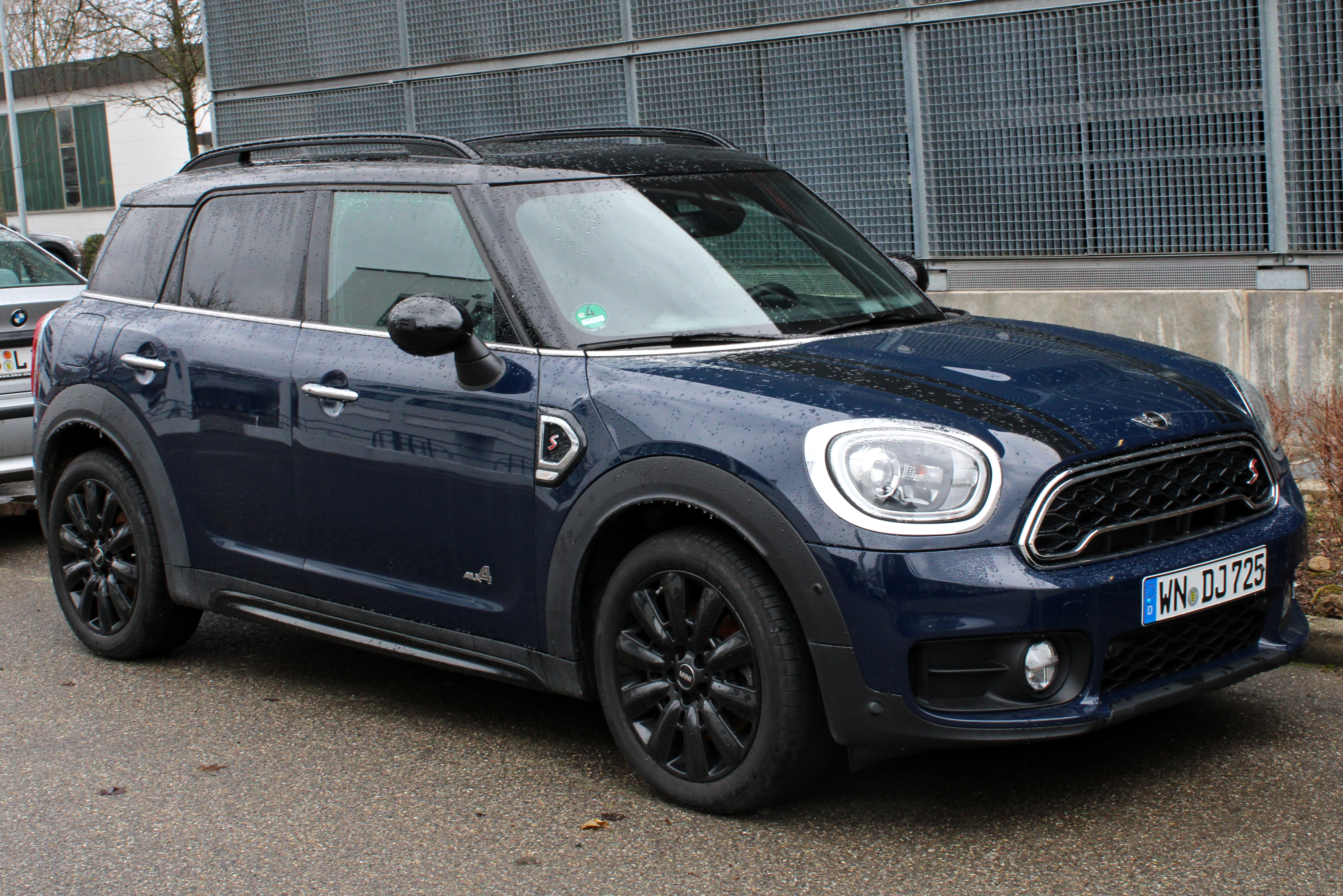 Mini Countryman Cooper SD in Stuttgart-Vaihingen